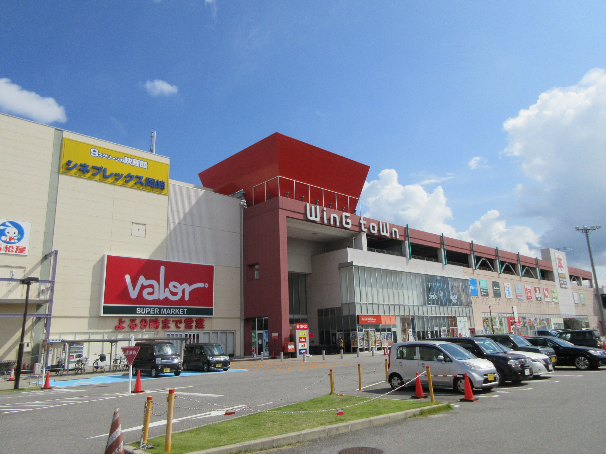 ウイングタウン（岡崎市羽根町）